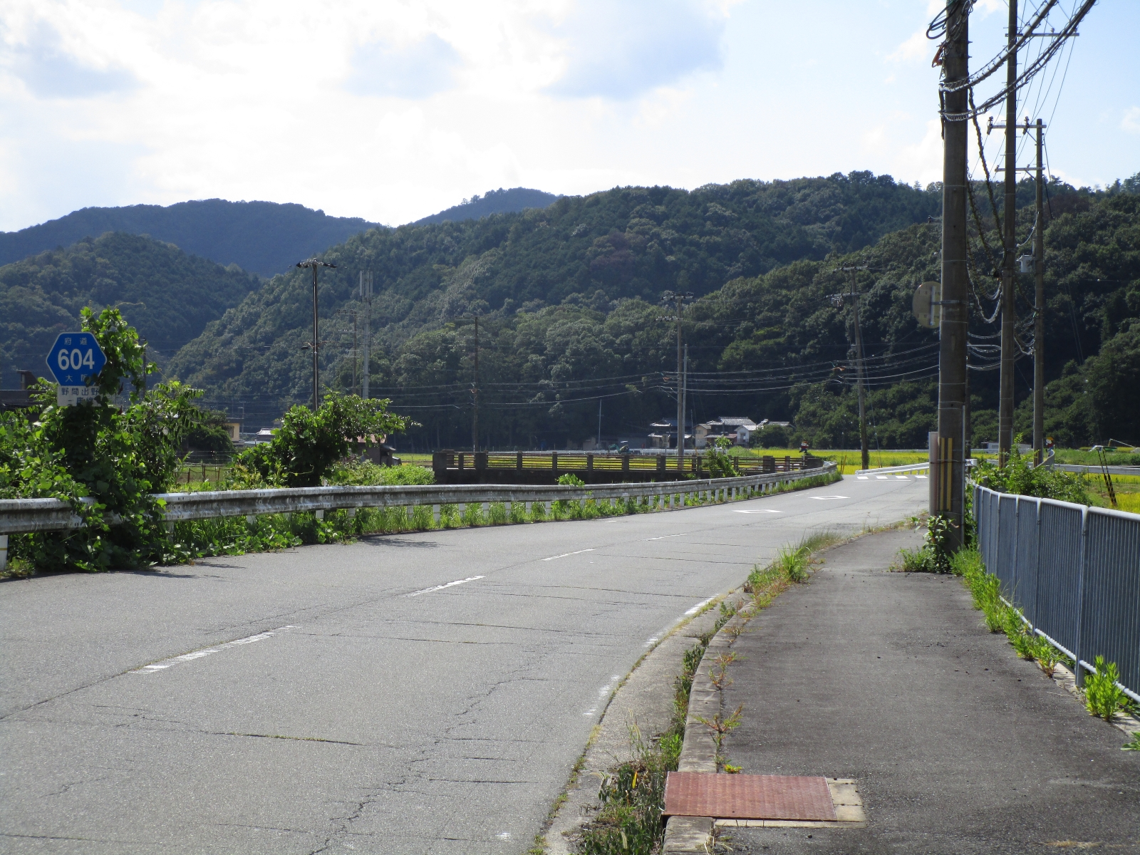 大阪府道・兵庫県道604号野間出野一庫線（能勢町野間出野より撮影）